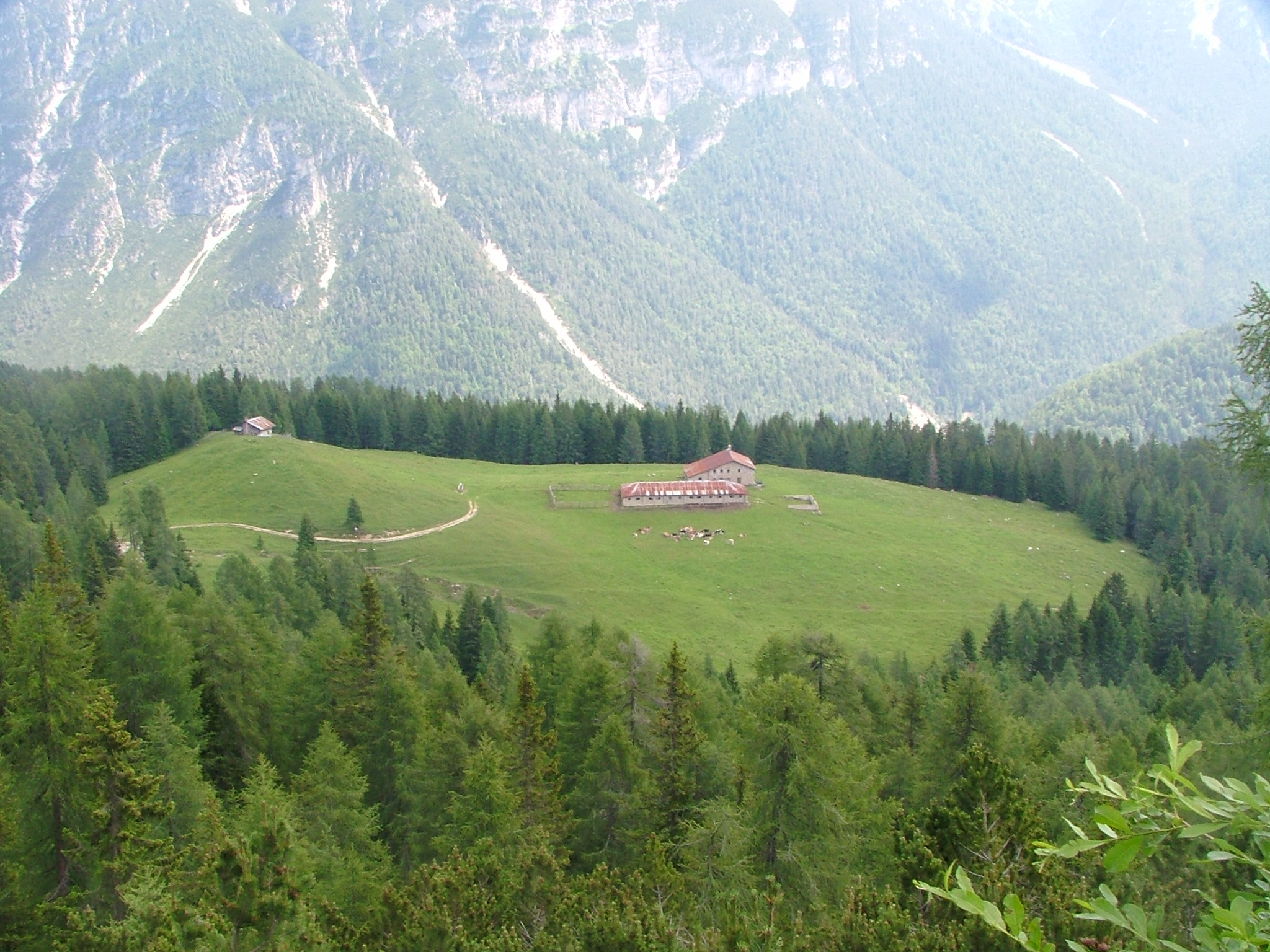 Casera Vedorcia Pieve di Cadore, Province of Belluno, Veneto, Italy